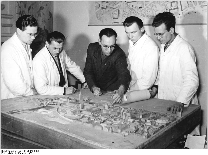 Rostock, Architekten bei der Stadtplanung Zentralbild Klein 9.2.1955 Städteaufbau in der Deutschen Demokratischen Republik 2.Folge. Aufbau in Rostock Rostock ist heute ein großer Bauplatz. Durch die Unterstützung unserer Regierung und durch die vorbildliche Initiative der Rostocker, die allein im Jahre 1954 366 778 freiwillige Aufbaustunden leisteten und dadurch 1 199 386,94DM unserem Staat einsparten, ist der Aufbau der Stadt weit vorgekommen. 1955 sollen 675 Wohnungseinheiten fertiggestellt werden. UBz: Während in der Strasse des Nationalen Aufbauwerkes die Bauten emporwachsen, beschäftigen sich die Rostocker Städtebauer mit der Planung der späteren Bauabschnitte.- Am Arbeitsmodell des Stadtzentrums bespricht der stellvertretende Abteilungsleiter des Stadtarchitekten, Kollege Colden (Mitte) mit Architekten und Graphikern der Abteilung Stadtplanung städtebauliche Probleme wie die endgültige Gestaltung des Zentralen Platzes.